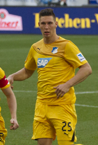 Niklas Süle with Hoffenheim in 2014.